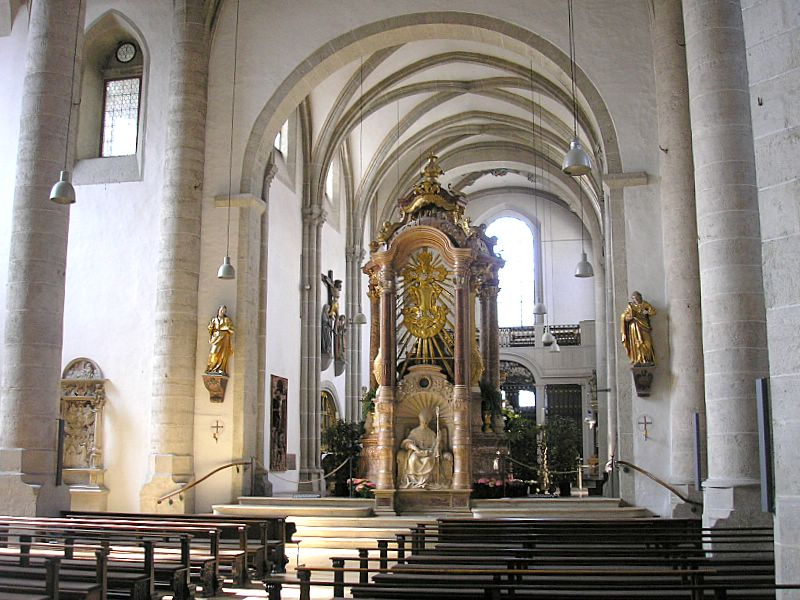 Dom zu Eichstätt (Oberbayern). Blick in den Willibaldschor (Westchor). Eigene Aufnahme, April 2007 / Eichstaett cathedral (Upper Bavaria, Germany). View into the western choir (Willibaldschor). Own photo, April 2007